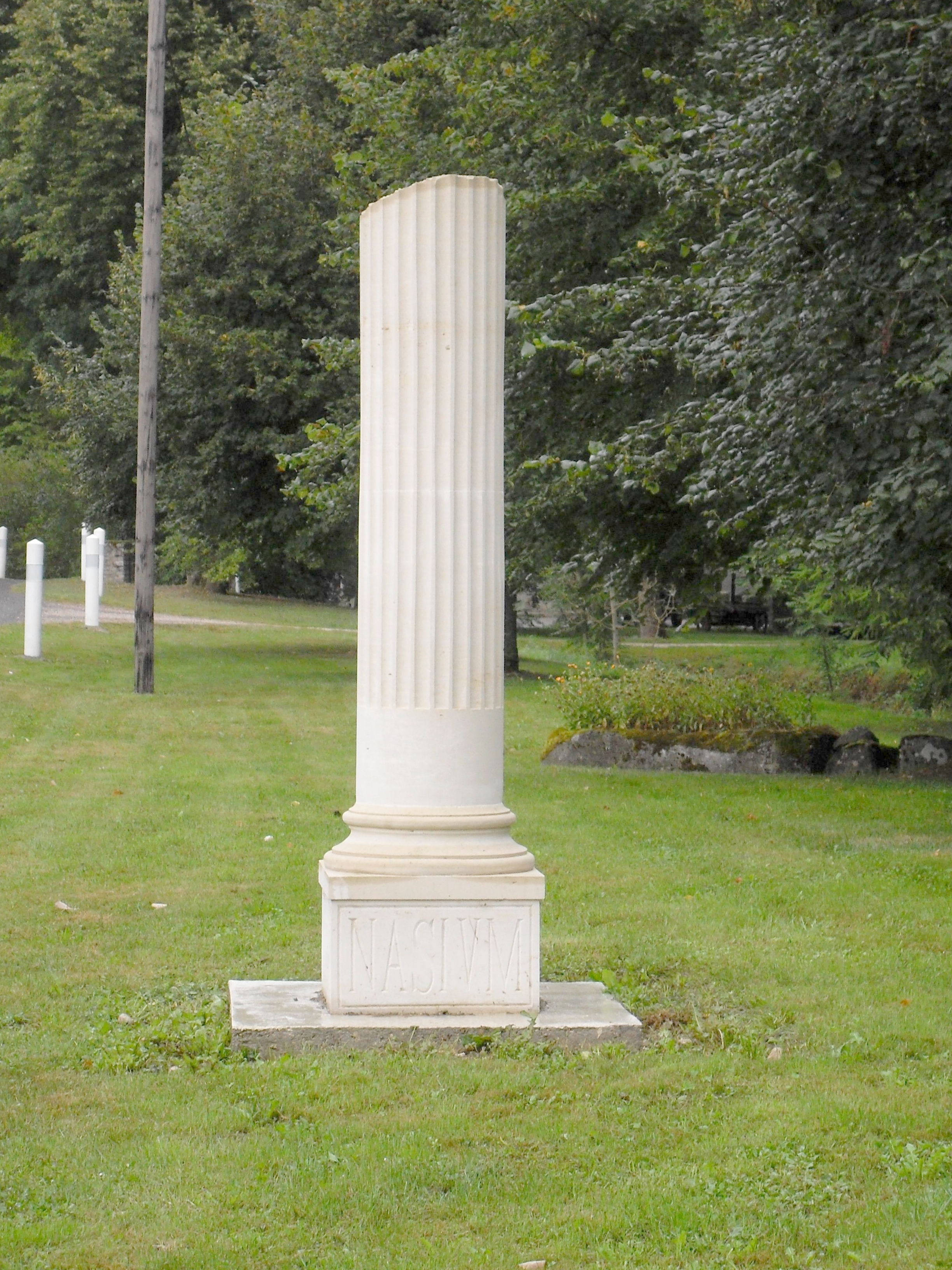 Boviolles colonne Nasium Ainsi s'exprimait Ranxin dans son Voyage historique et pittoresque sur les ruines de Nasium[1] : ICI FUT NASIUM. Je désire qu'une colonne militaire avec cette seule et simple inscription, érigée sur le grand chemin qui traverse la voie romaine au milieu de ces ruines, en perpétue le souvenir.